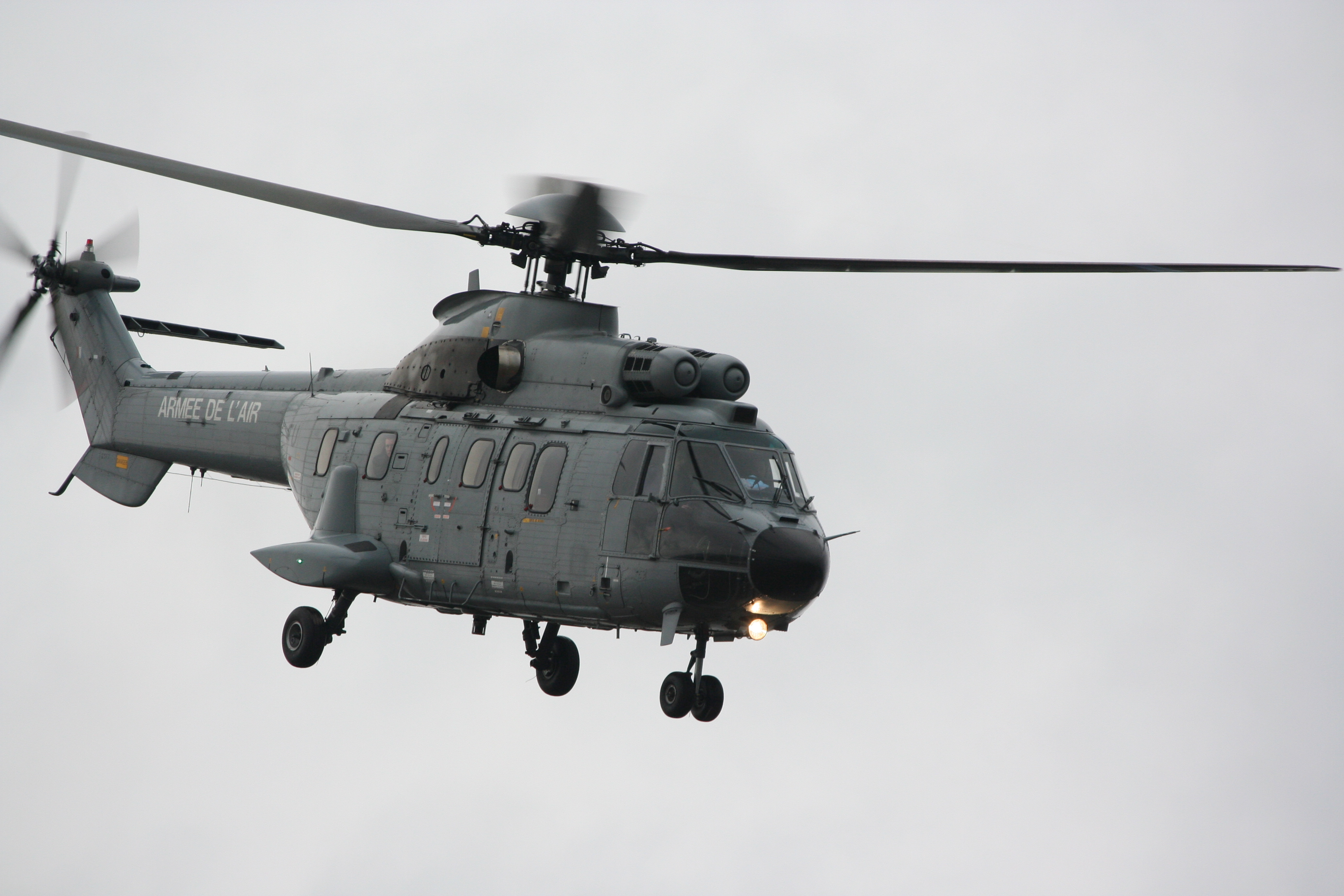 Visite de Nicolas Sarkozy à Saint-Lô en janvier 2009